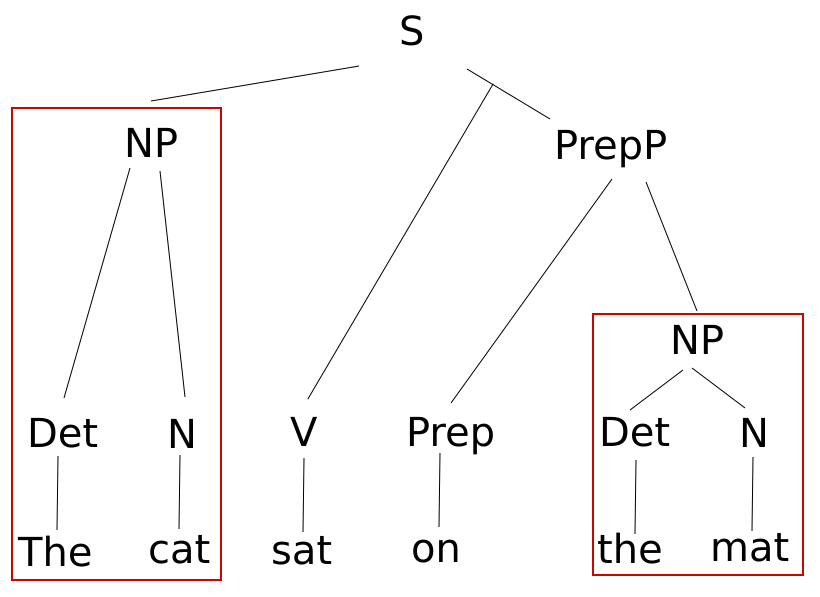 Rozbiór gramatyczny zdania: The cat sat on the mat